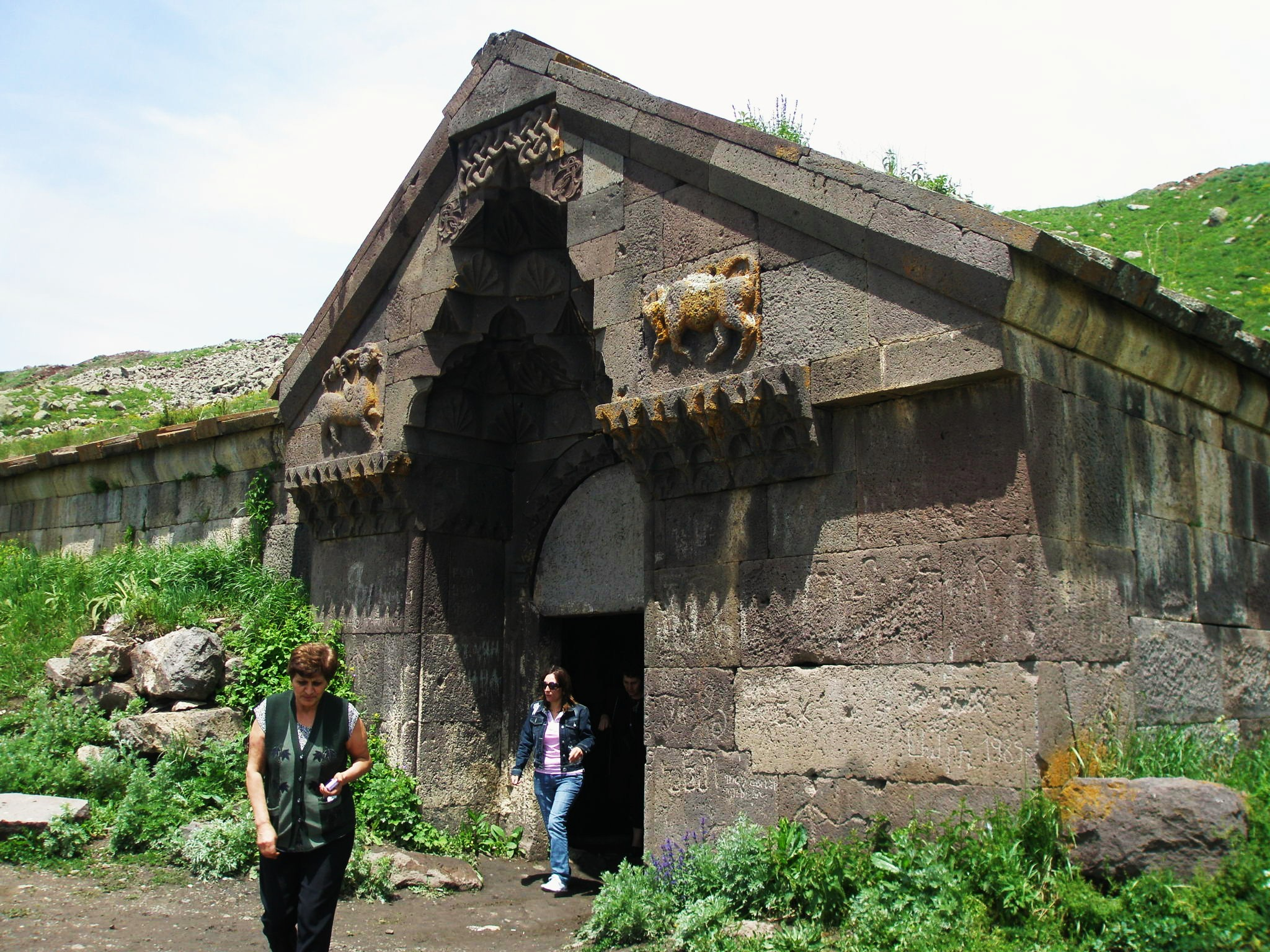 Selim Caravanserai 7/1.2